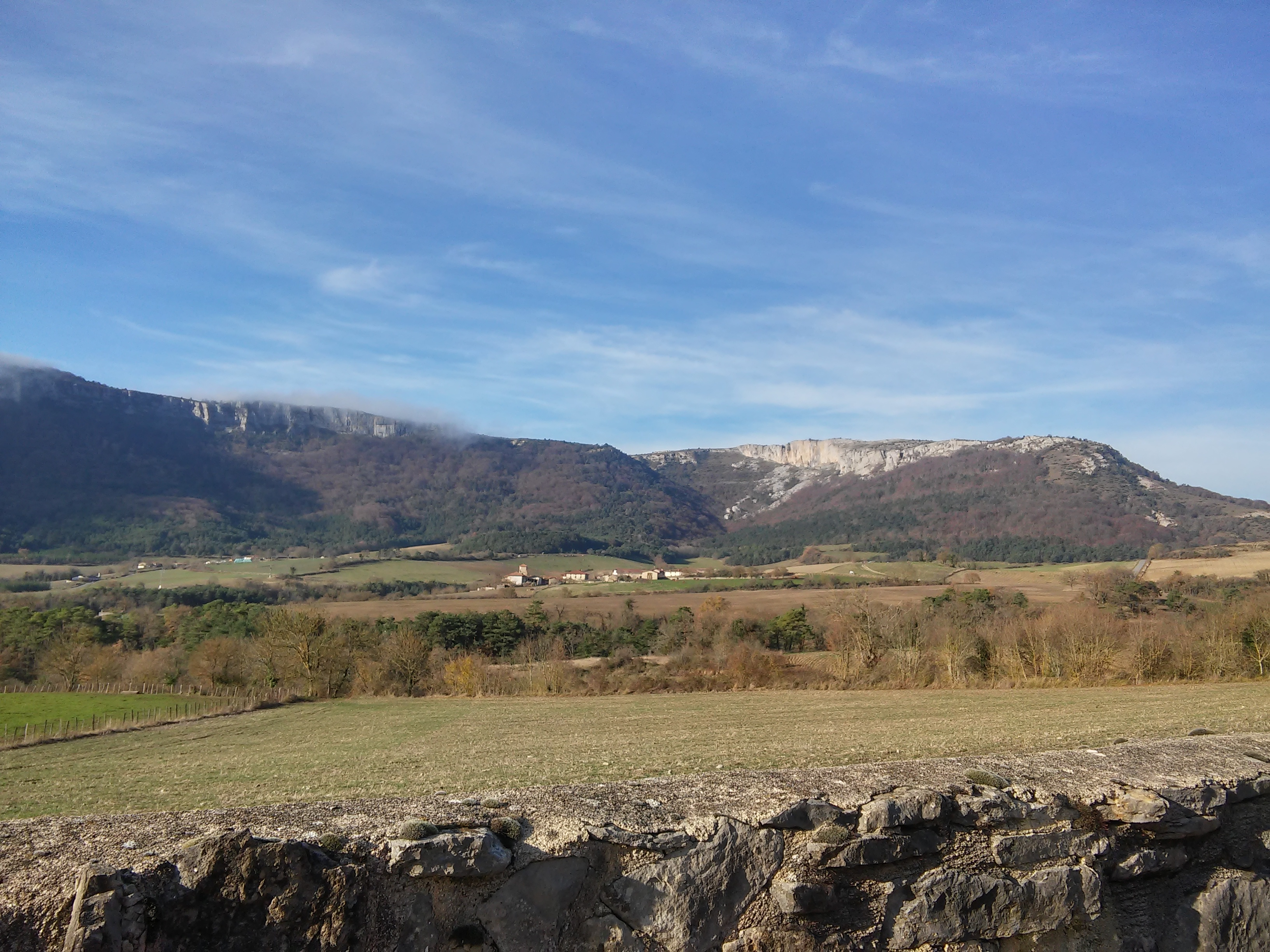 Luna herria (Kuartango), atzean Arkamu mendilerroa